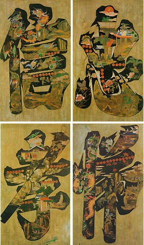 민화 - 문자도, 종이에 채색74.2 × 422.2㎝; (信, 忠, 孝, 悌)